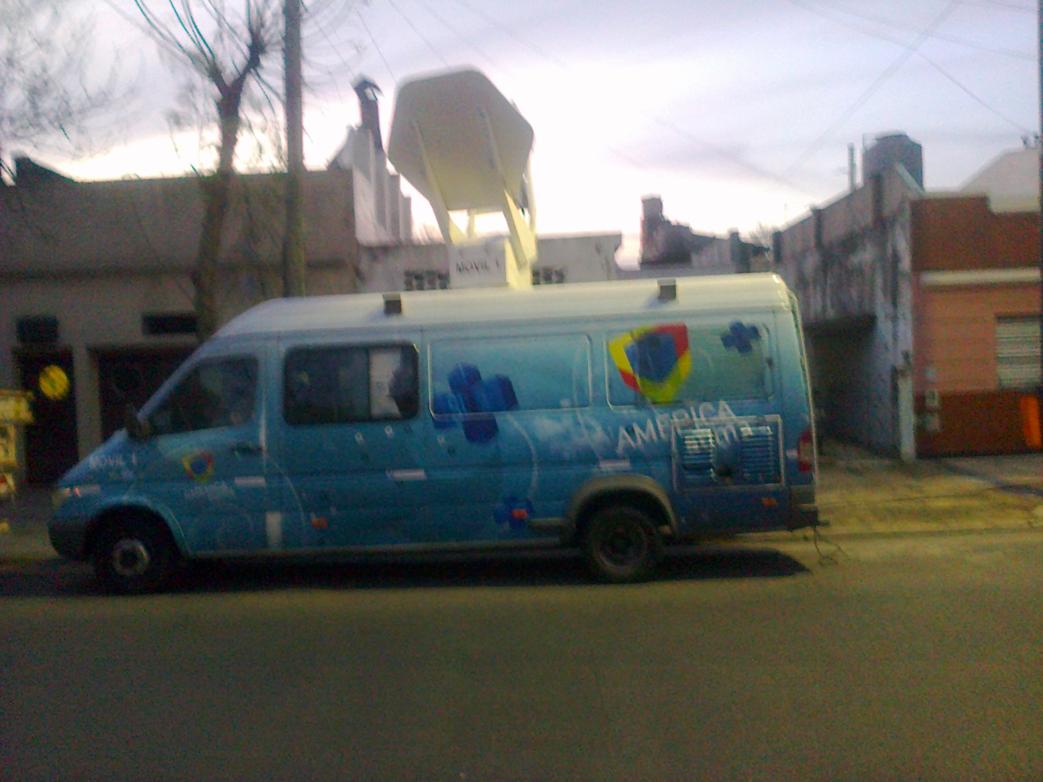 Móvil del canal televisivo América TV